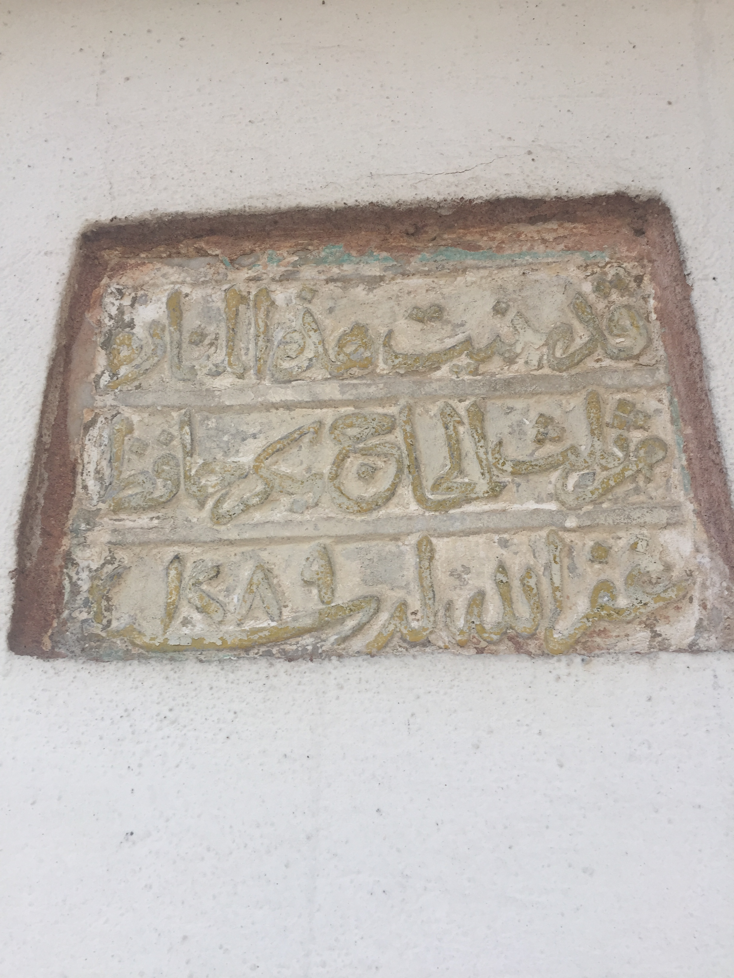 Sekibaşı Camii, Muğla